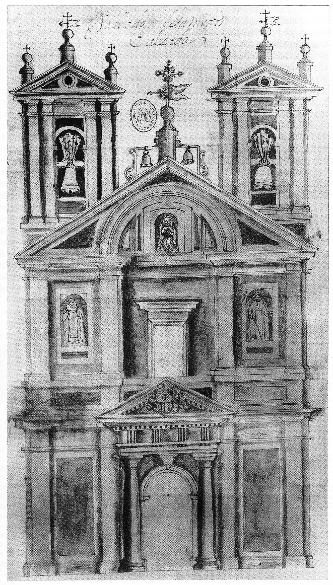 Portada del convento de la Merced Calzada en Valladolid (patrimonio perdido). Dibujo realizado por Ventura Pérez para ilustrar la Historia de Valladolid de Antolínez de Burgos. Siglo XVIII.